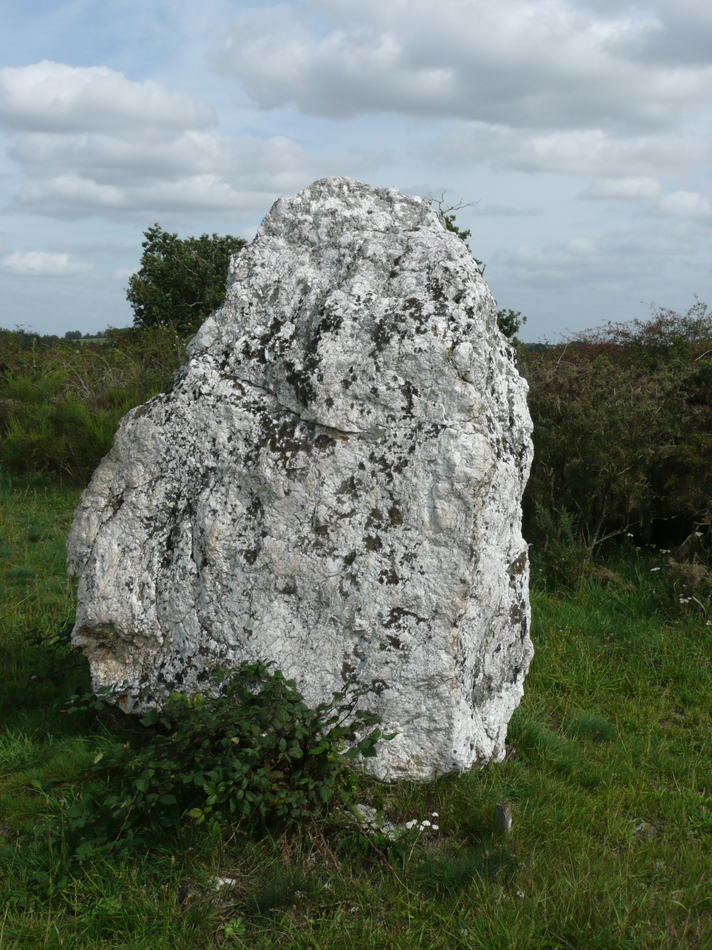 Alignement mégalithique de Freigné